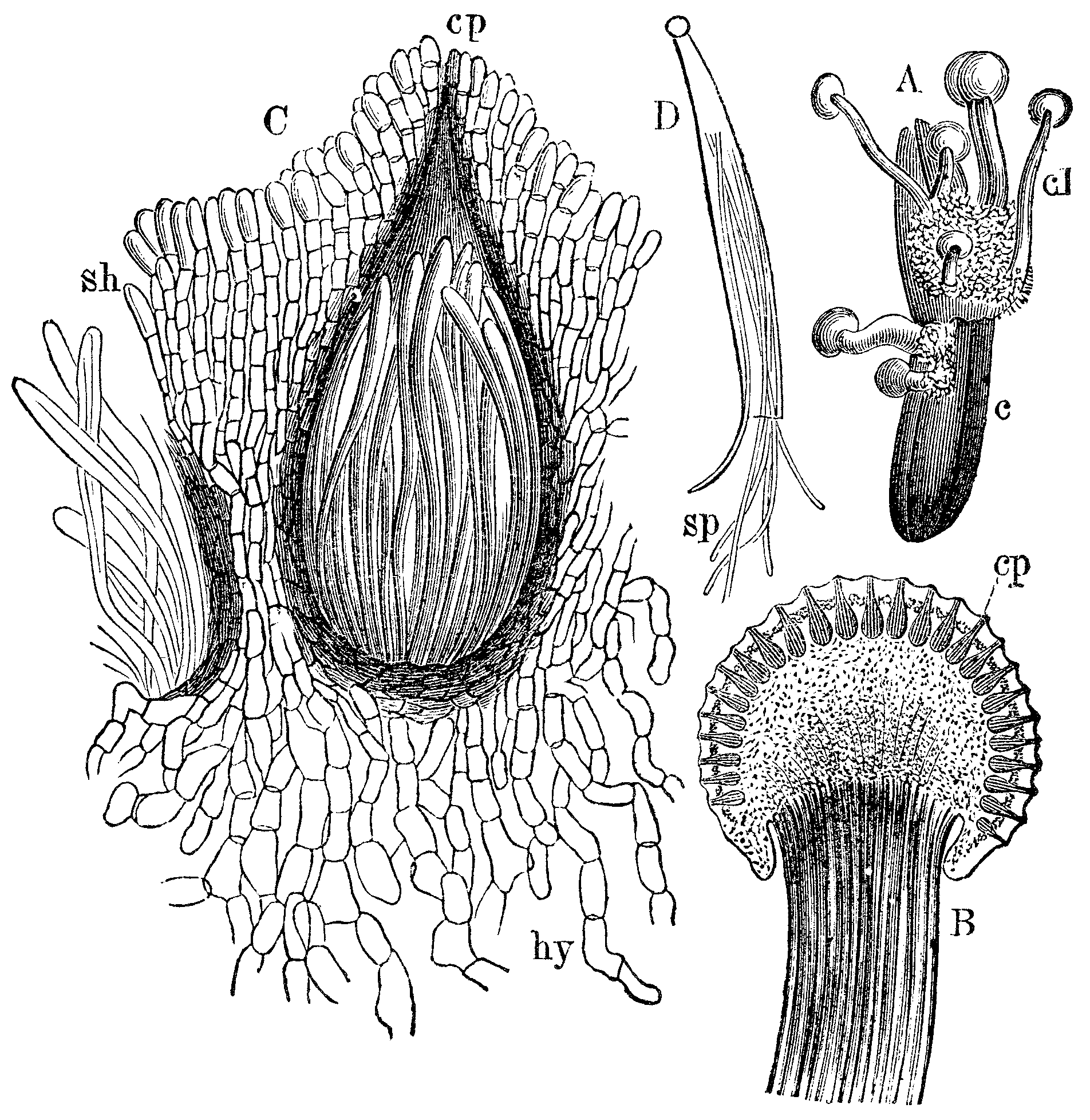 Slika 335 a. Ržéni rožiček. (Cláviceps purpúrea.)